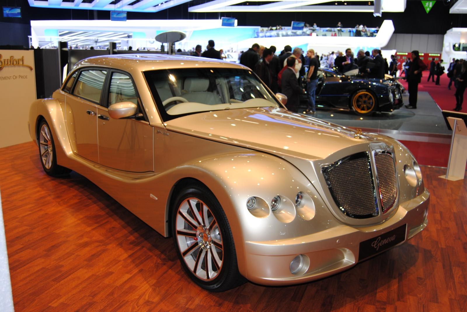 Bufori Geneva automobile — at Motorshow Geneva 2010. Geneva2010 454